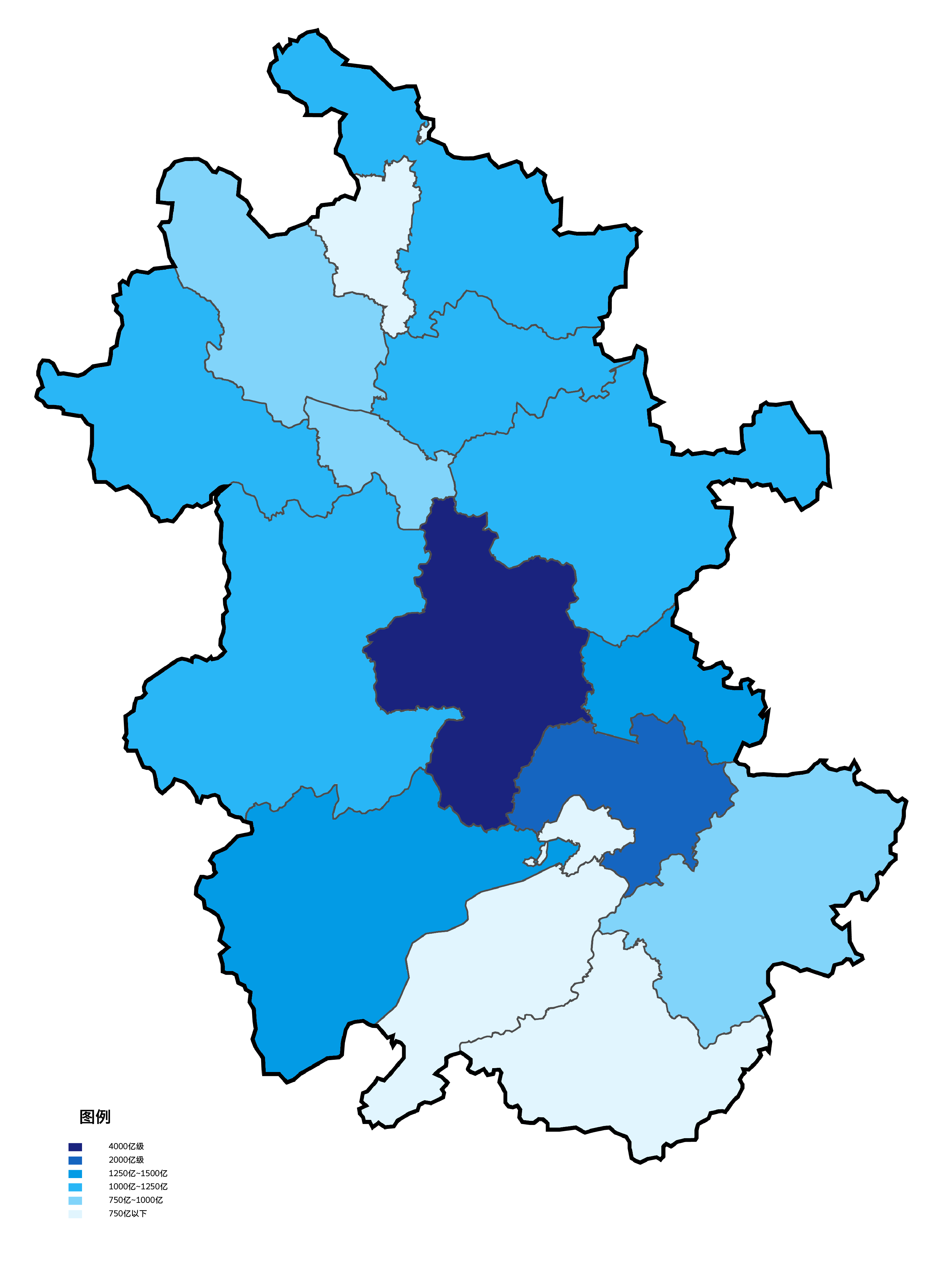 安徽省各地级市根据2013年地区生产总值填色地图